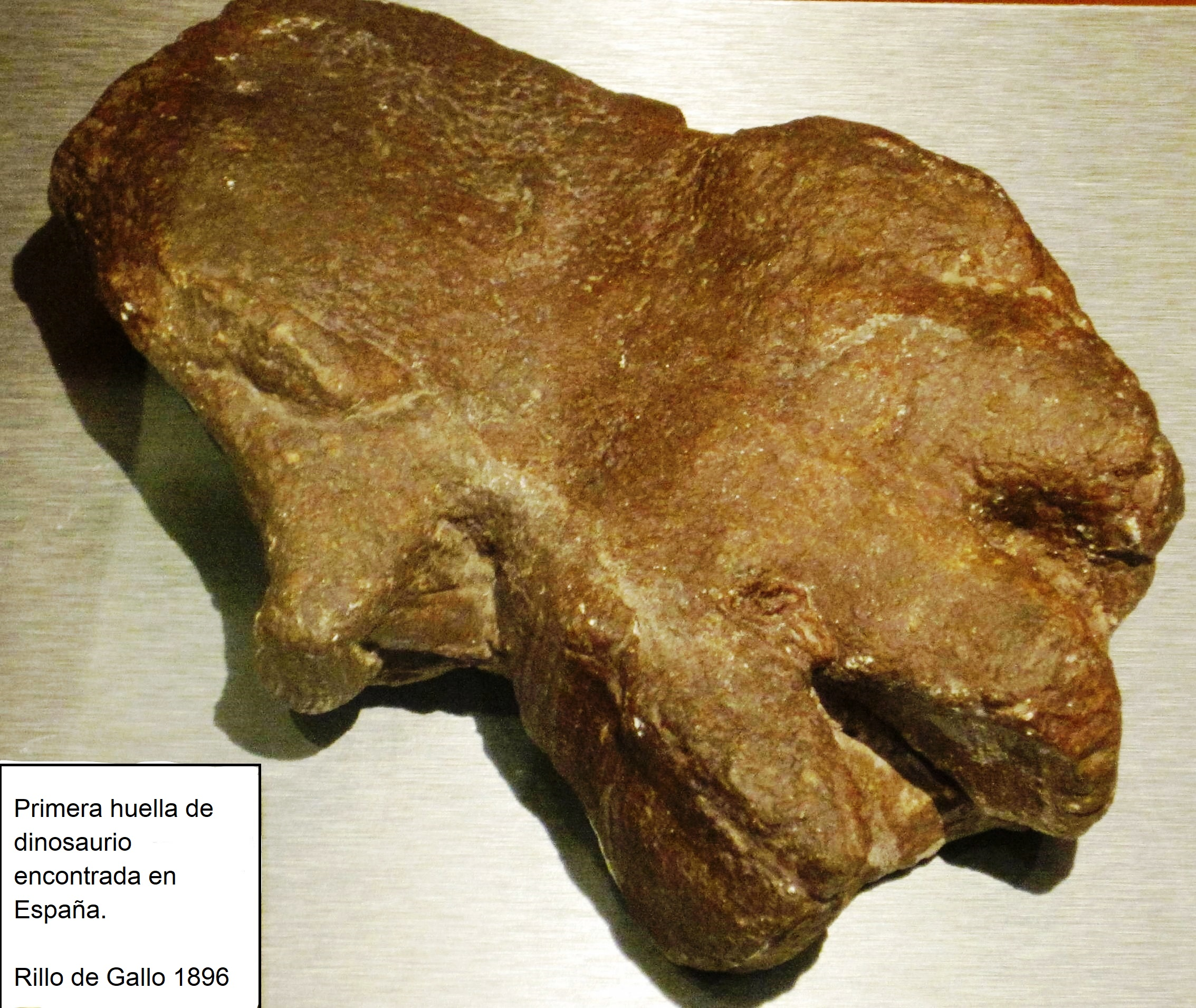 Tomada con una cámara Canon IXUS 9515